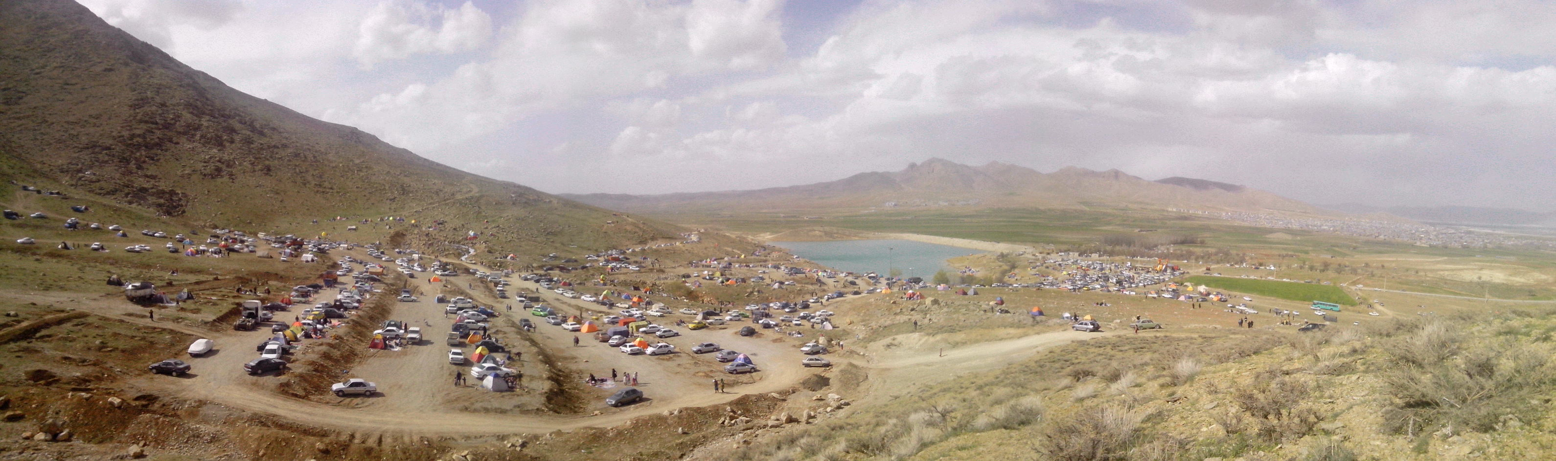 گردشگاه چشمه زنه جهان بین شهر هفشجان